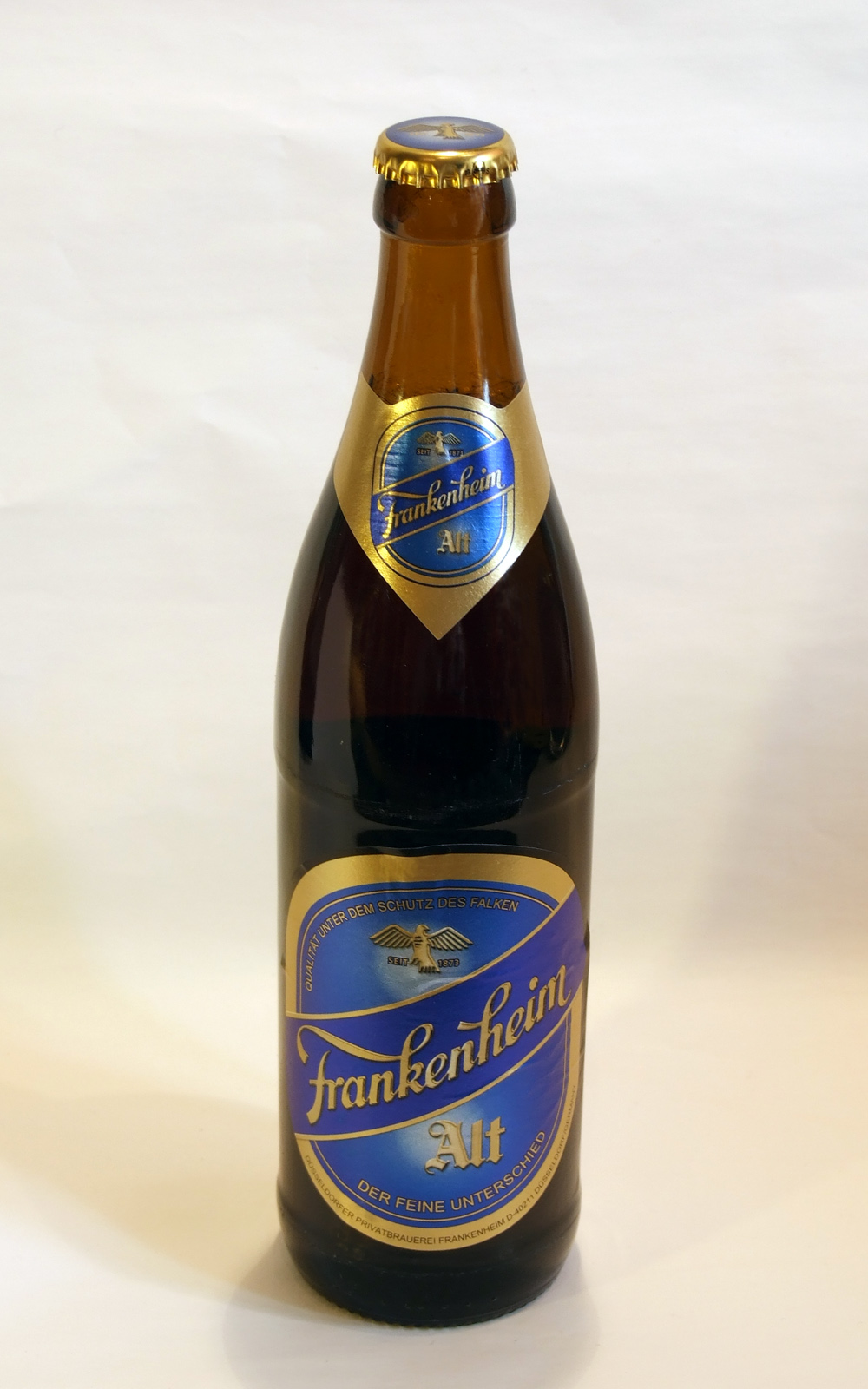 Bottle of Frankenheim Alt (German beer)